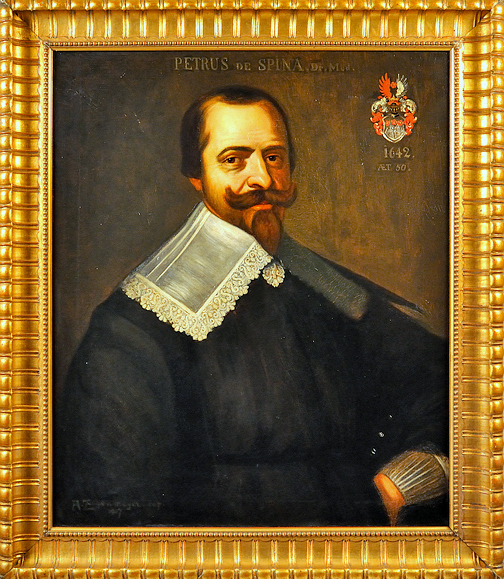 Ölporträt des Artzes Peter de Spina III.